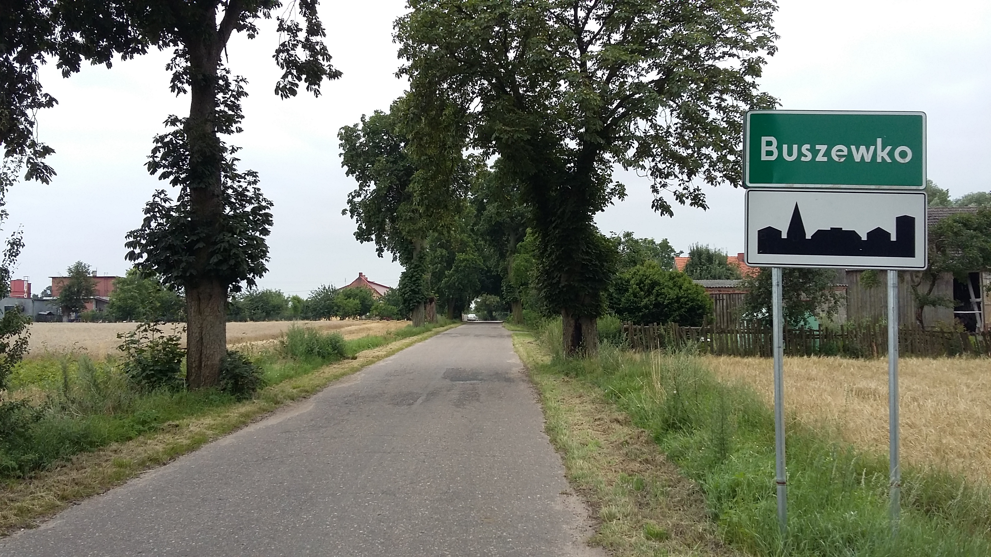 Zdjęcie wsi.